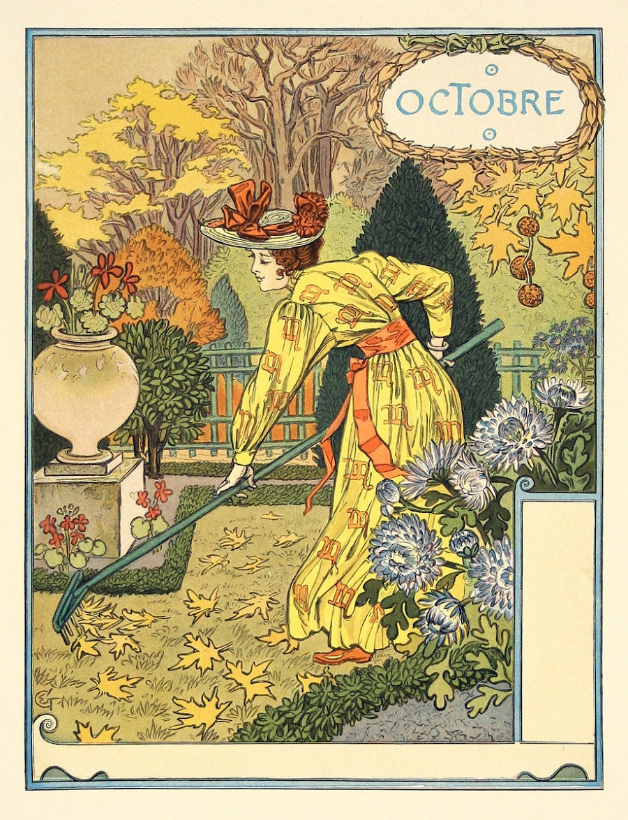 Bild von Eugène Grasset für den Oktober